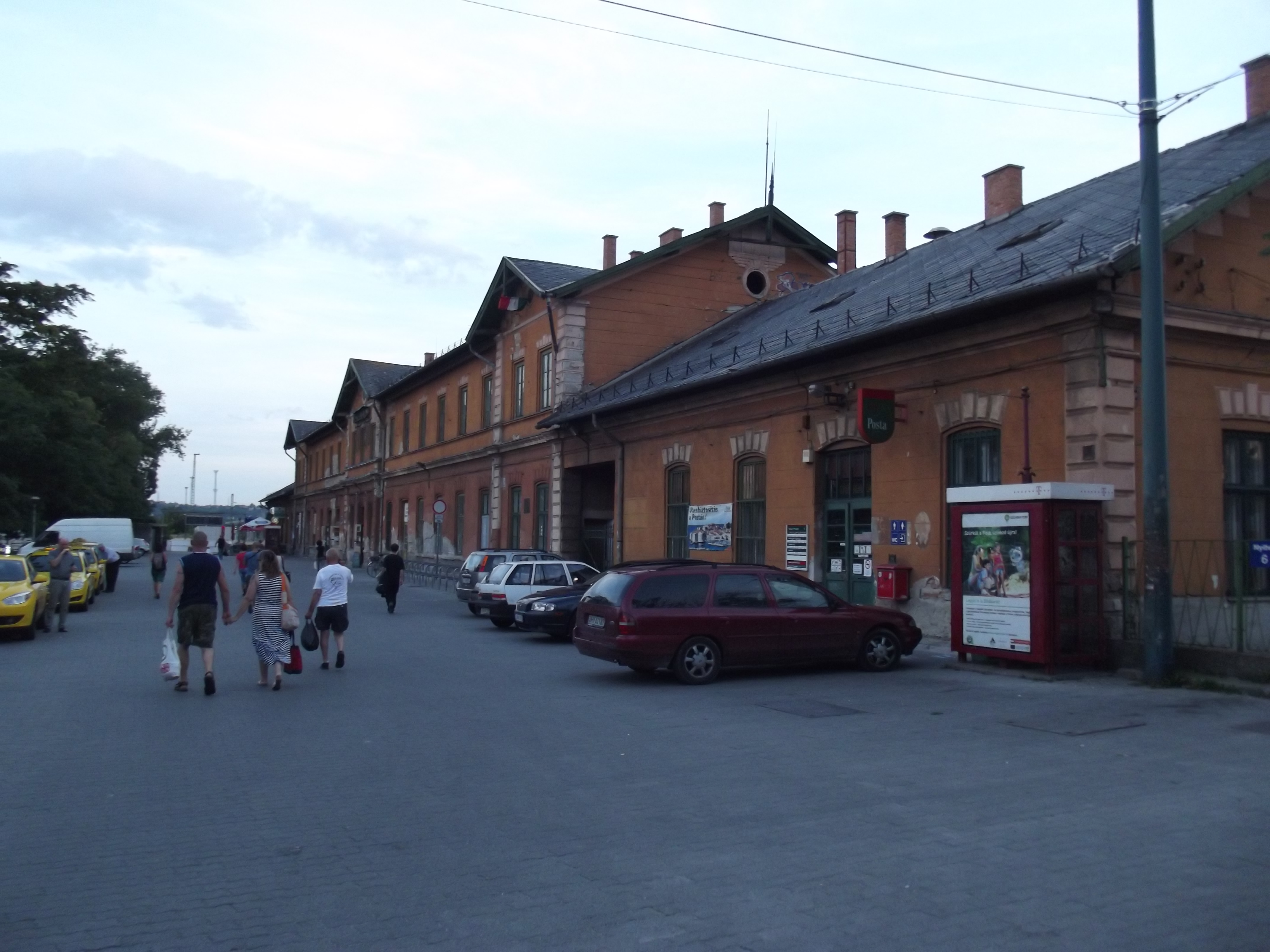 Het stationsgebouw van Kelenföld station in Budapest